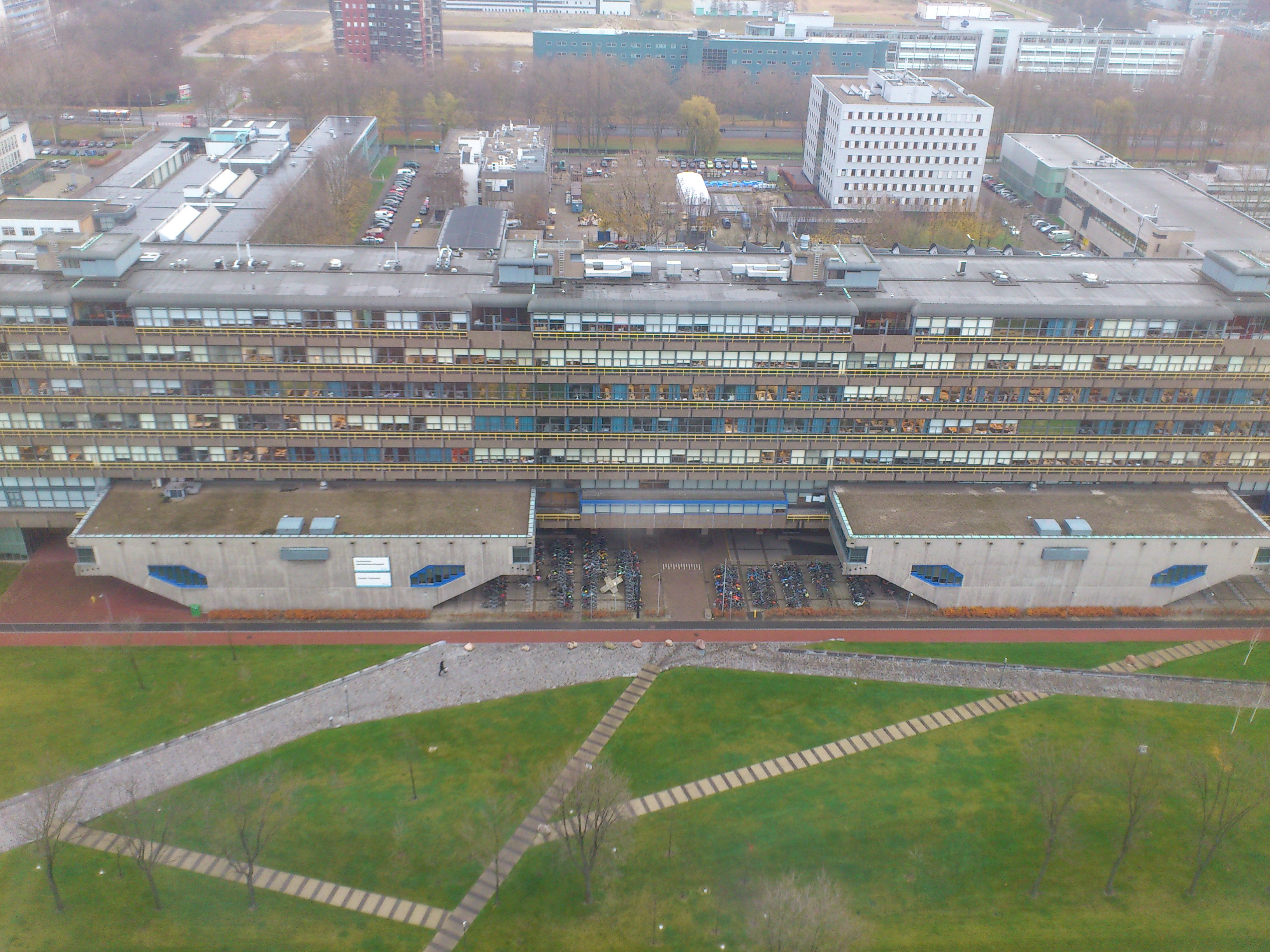 Gebouw van de Faculteit Civiele Techniek en een deel van het Mekelpark gezien vanaf de hoogste verdieping van het gebouw van EWI er tegen over.